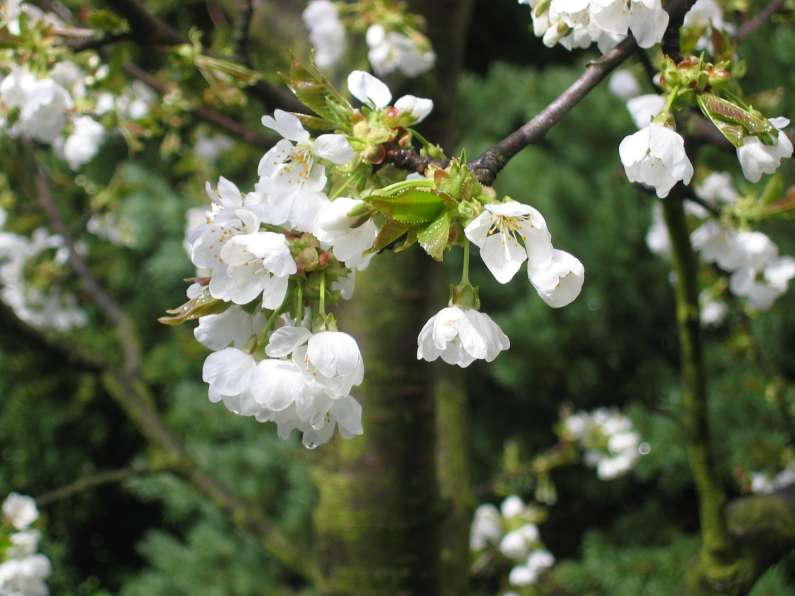 Kirschblüten